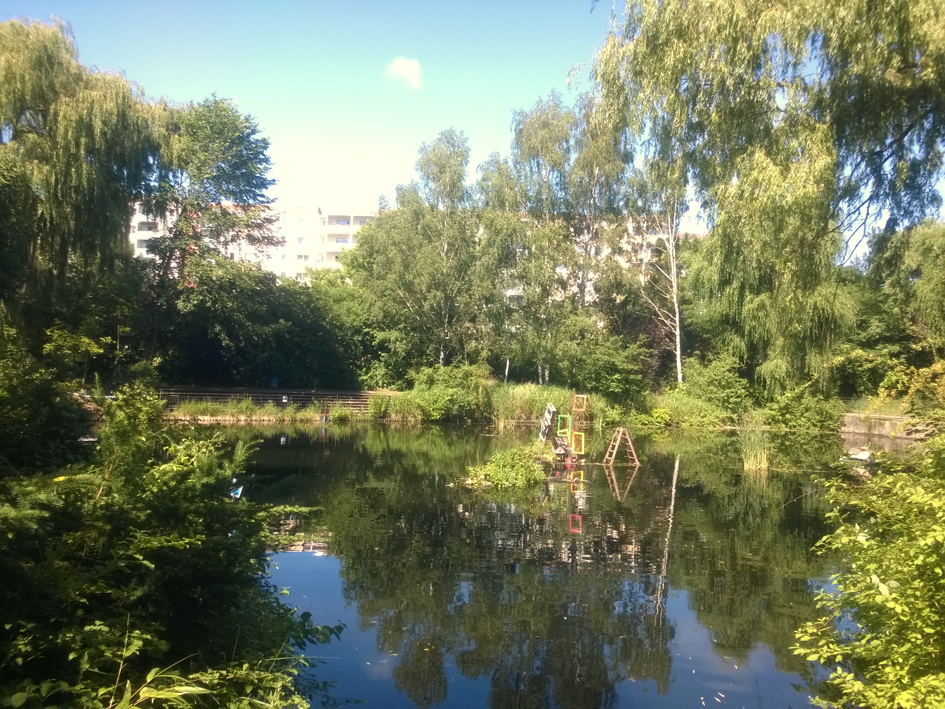 Berlin-Prenzlauer Berg Ernst-Thälmann-Park See